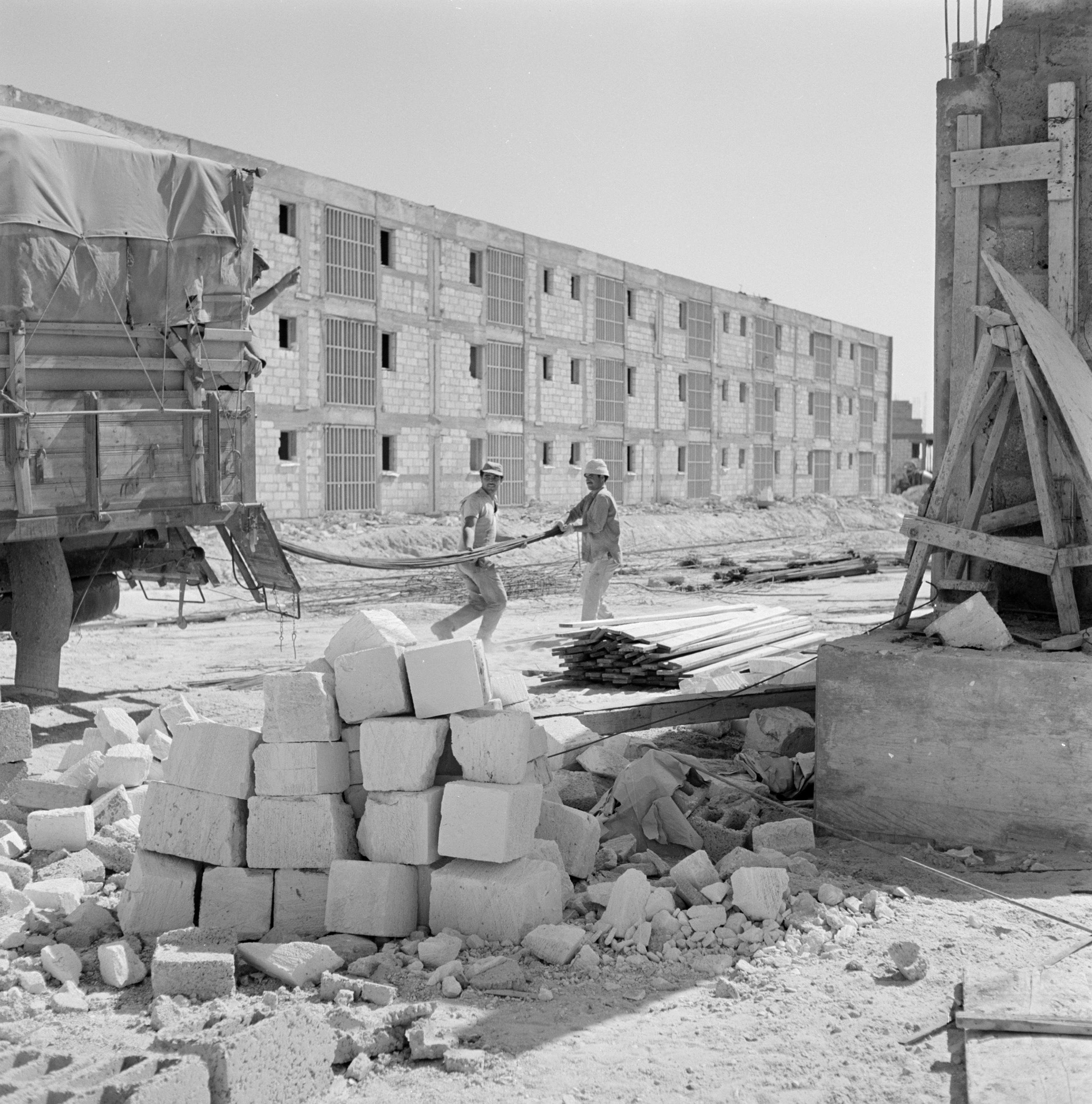 Collectie / Archief : Fotocollectie Van de Poll Reportage / Serie : Israël - Dimona Beschrijving : Straat met nieuwbouwwoningen - flats - in de stad Dimona bij de Dode zee. Arbeiders laden latten of buizen uit een vrachtwagen Datum : 1 januari 1963 Locatie : Dimona, Dode Zee, Israël, Negev Trefwoorden : arbeiders, bouwmaterialen, flatgebouwen, nieuwbouw, woningbouw Fotograaf : Poll, Willem van de, [onbekend] Auteursrechthebbende : Nationaal Archief Materiaalsoort : Negatief (zwart/wit) Nummer archiefinventaris : bekijk toegang 2.24.14.02 Bestanddeelnummer : 255-3559